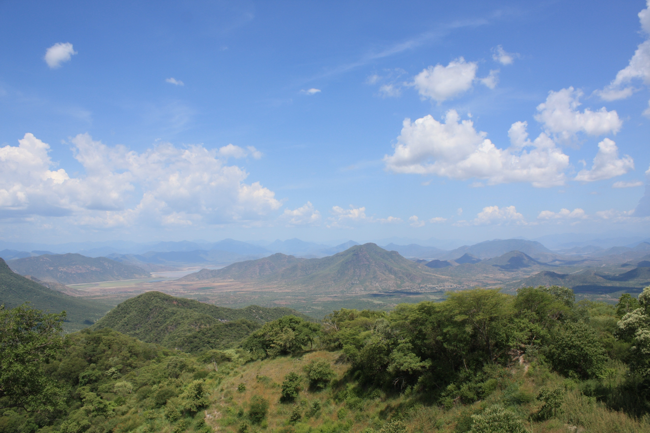 Vista de la Reserva de la Biosfera Zicuirán Infiernillo en primer plano, teniendo de fondo el estado de Guerrero. Foto tomada desde las faldas del Condémbaro, ubicado en la Huacana, Michoacán.